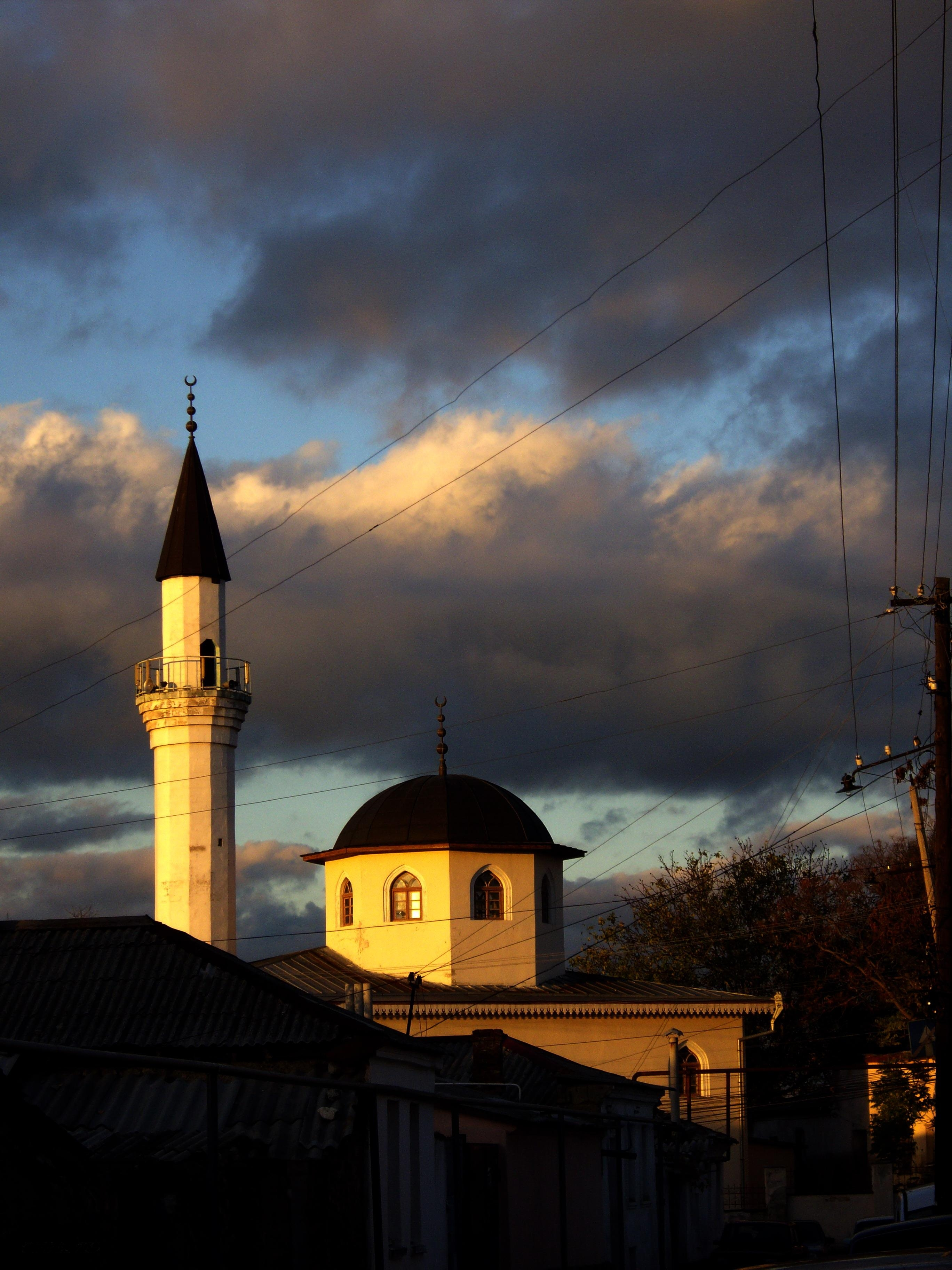 вул. Курчатова, 4 (1508 р., відновлена - 1740 р., 1947 р., реконструкція - 1994 р.))